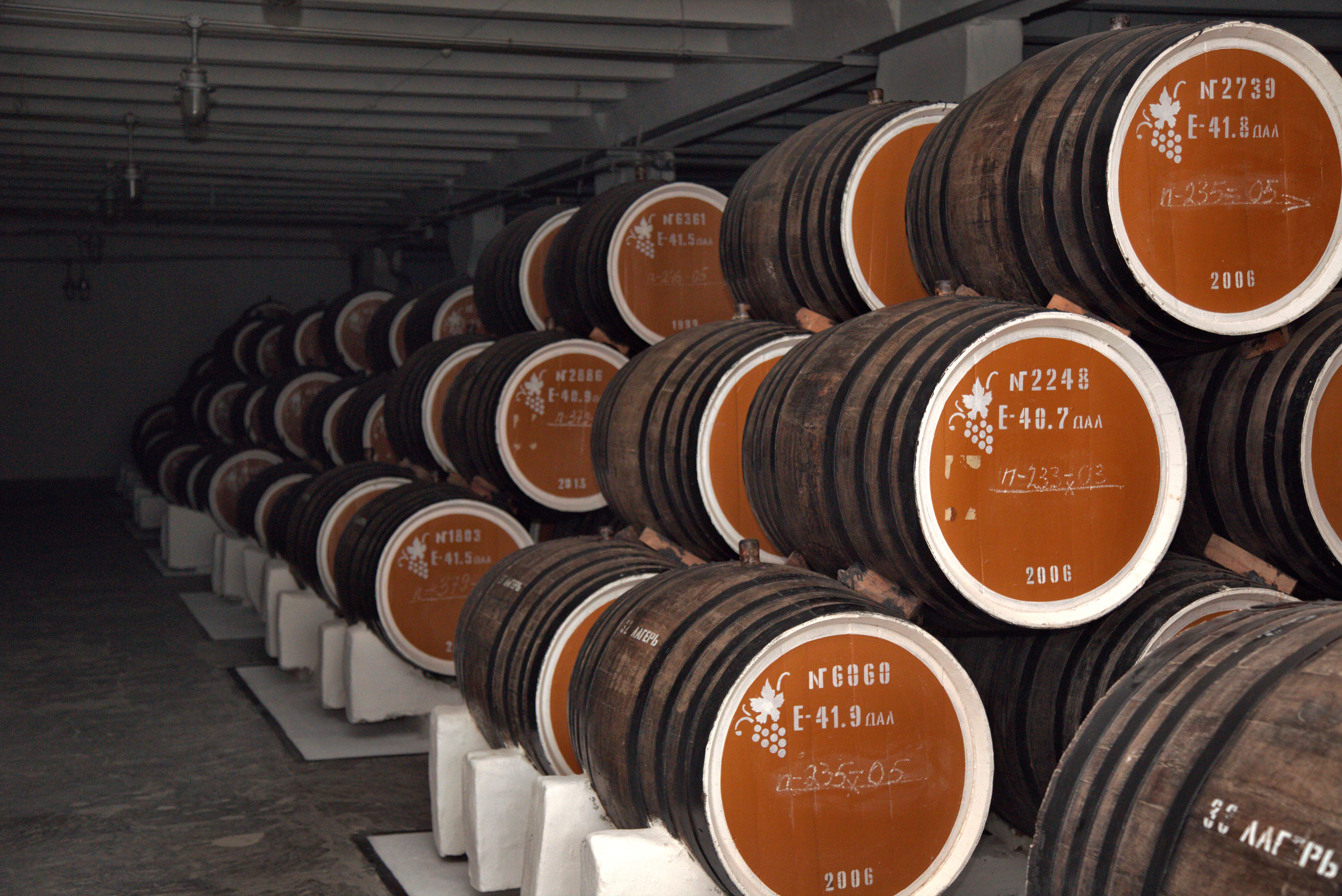 «Кизлярский коньячный завод»